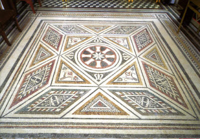 Пол в столовой Царицына павильона